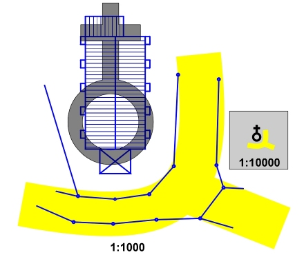 Kartographische Generalisierung: Vereinfachen zum kleineren Maßstab durch Verwendung von Symbolen